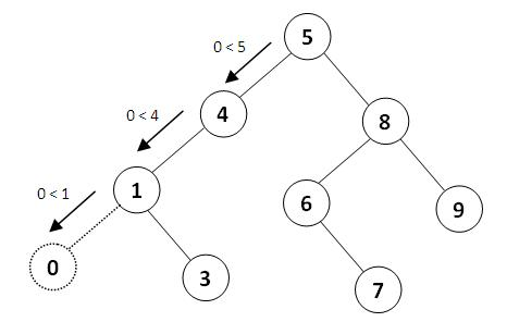 درج عنصر